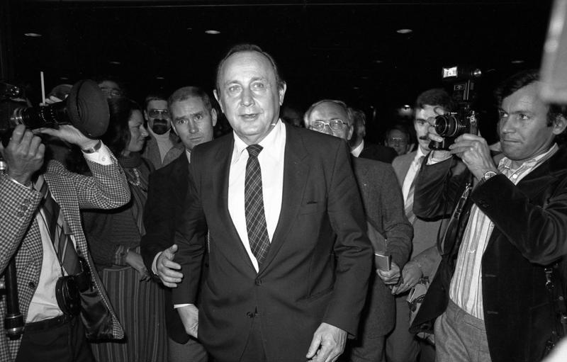 Bundestagswahl: Wahlparty im Bundeskanzleramt